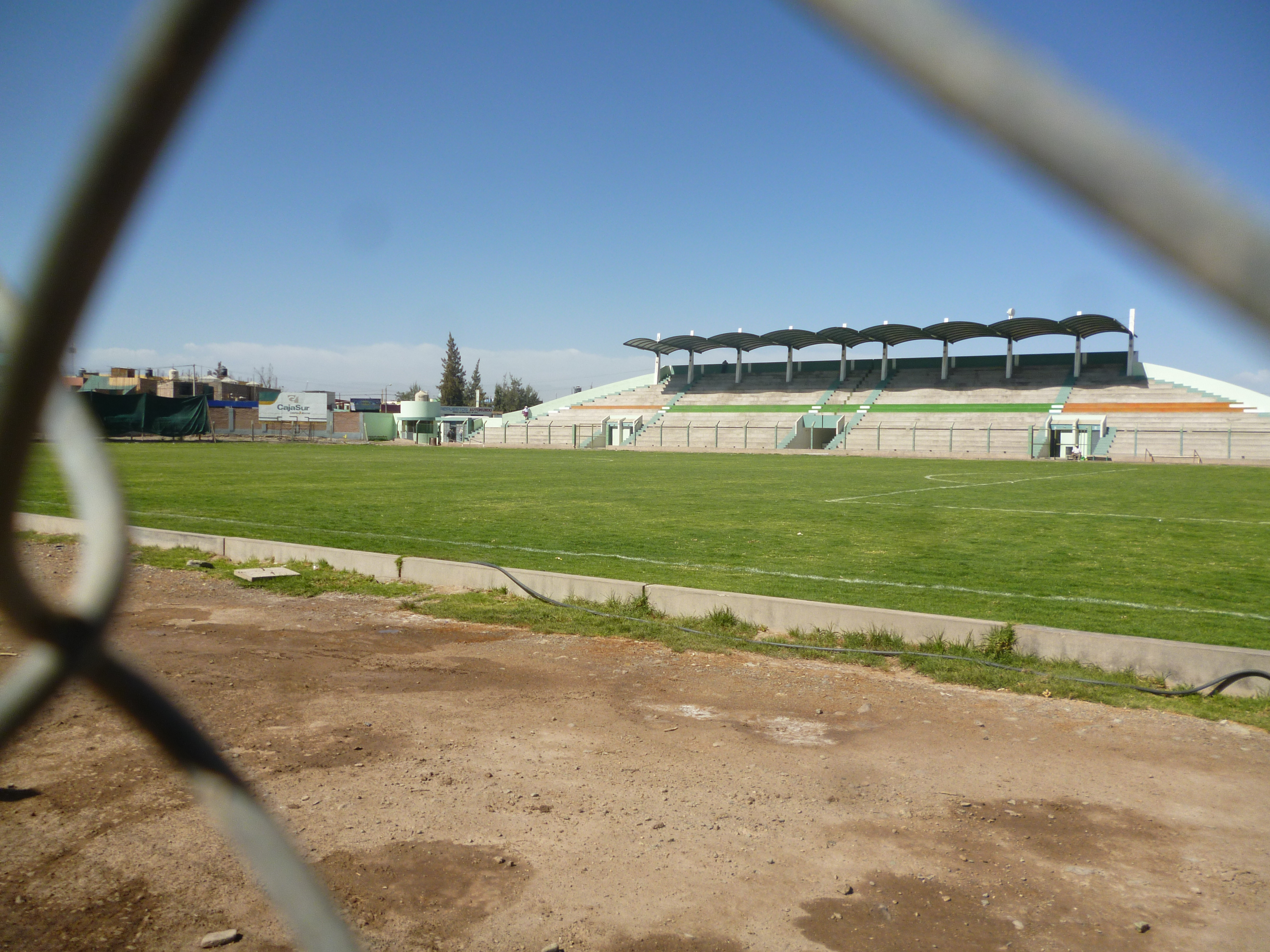 Foto de la Tribuna Oriente del estadio Almirante Miguel Grau en la ciudad de El Pedregal.